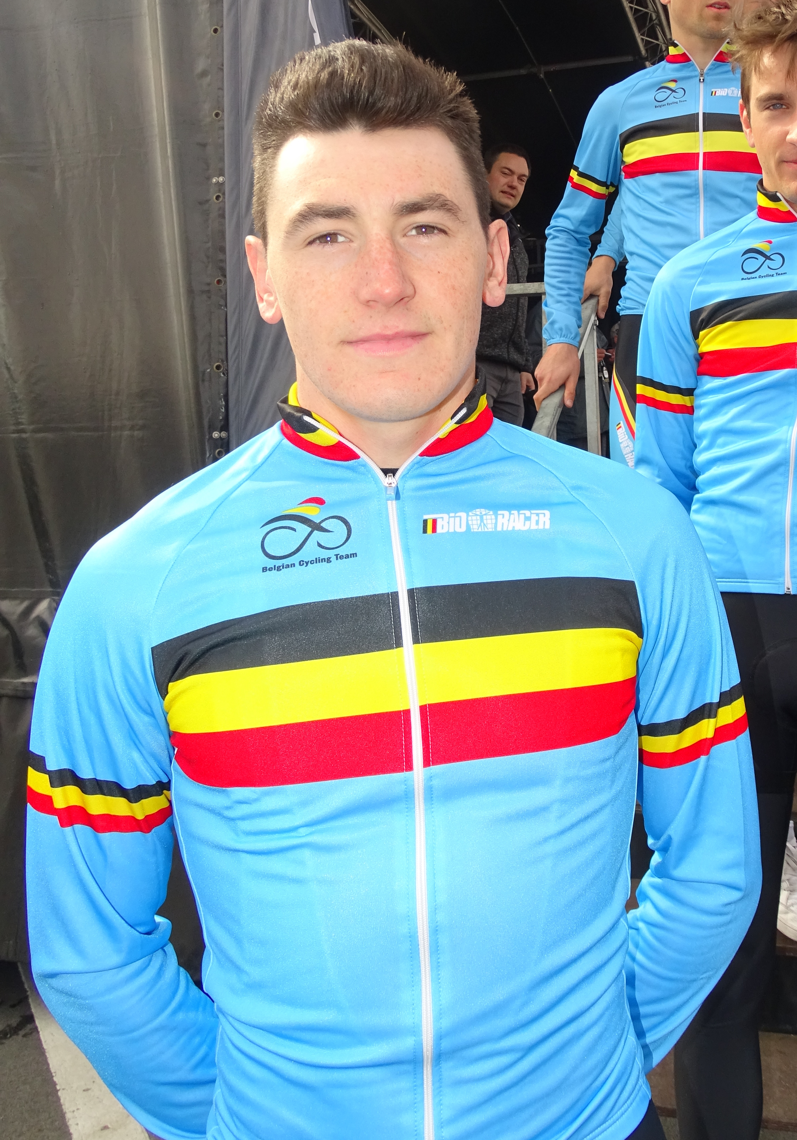 Reportage réalisé le samedi 9 avril à l'occasion du départ et de l'arrivée du Tour des Flandres espoirs 2016 à Audenarde, Belgique.